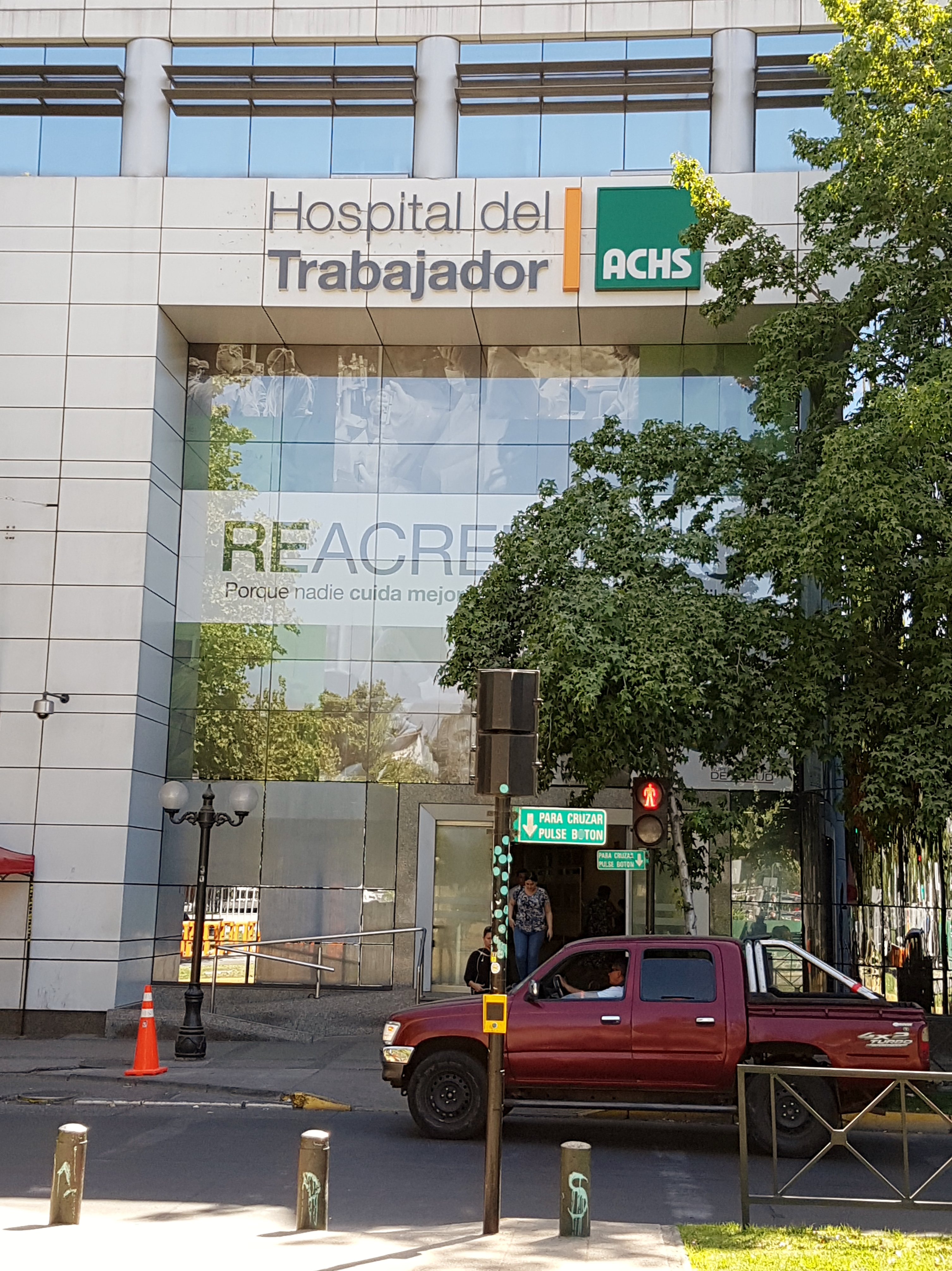 El Hospital del Trabajador, Ramón Carnicer 185 (metro Parque Bustamante, al costado oeste del parque del mismo nombre), comuna de Providencia, Santiago de Chile.